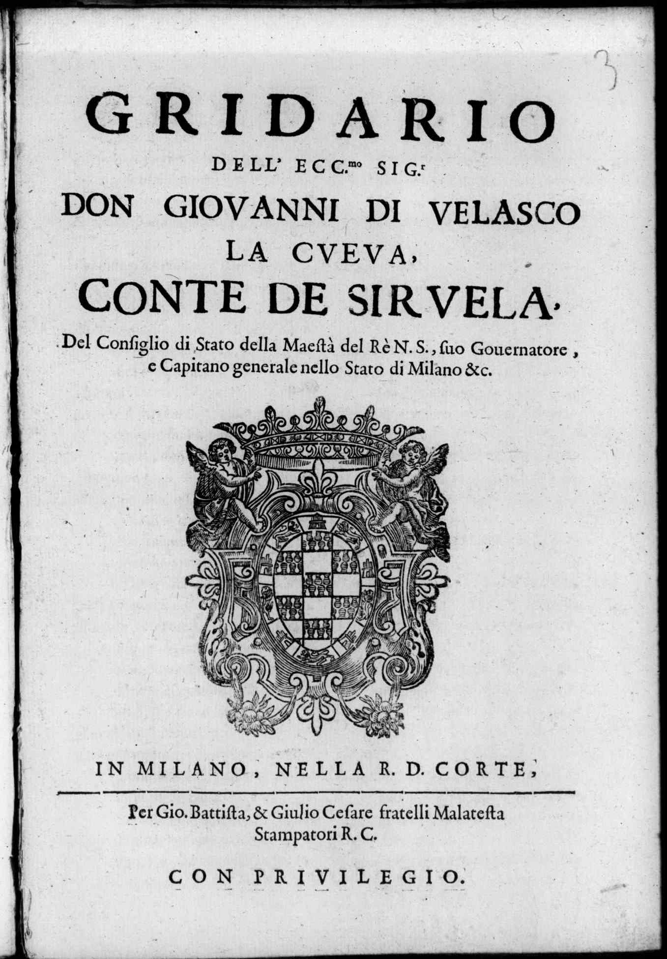 Frontespizio